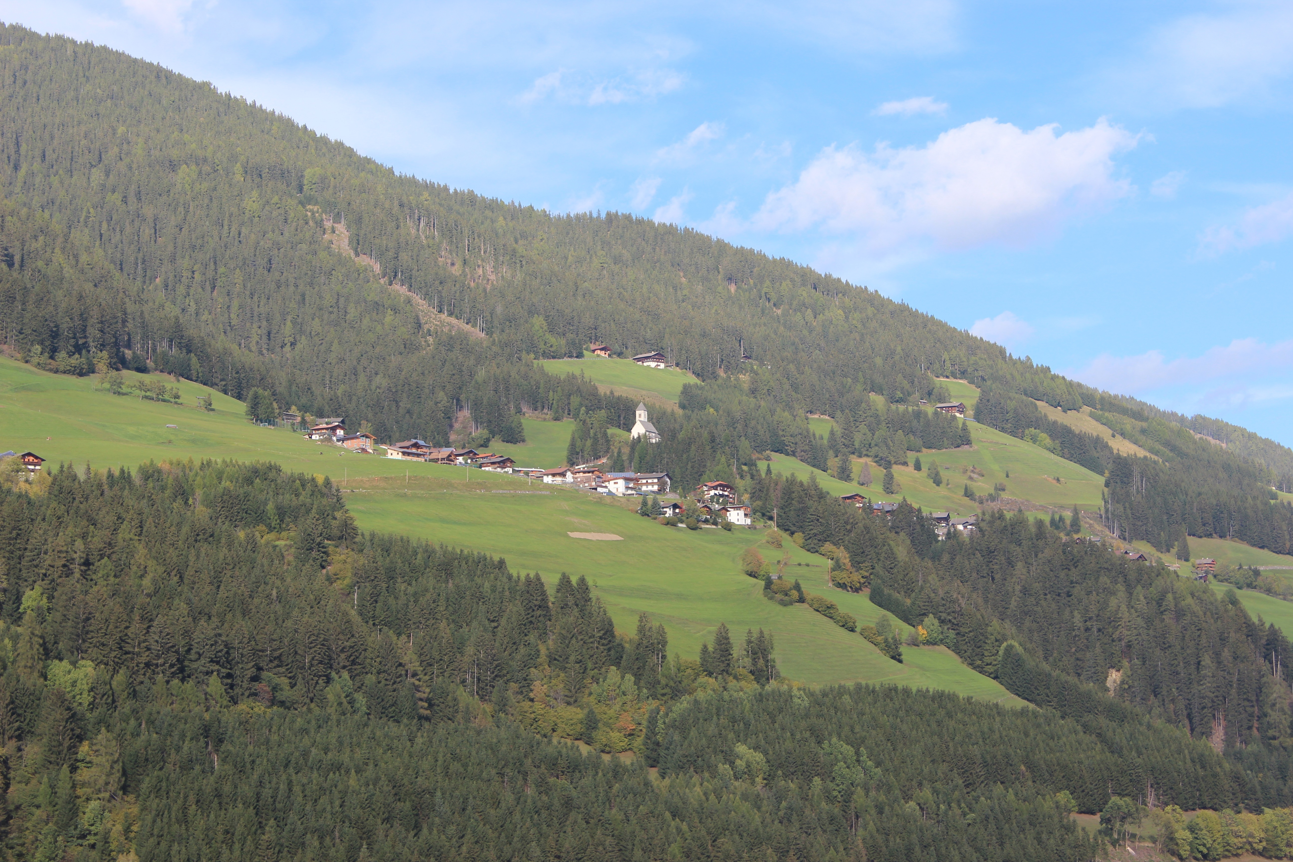 Tessenberg (Gemeinde Heinfels), Osttirol, Österreich.